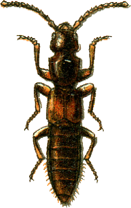 This file has been extracted from another file: Jacobs12.jpg